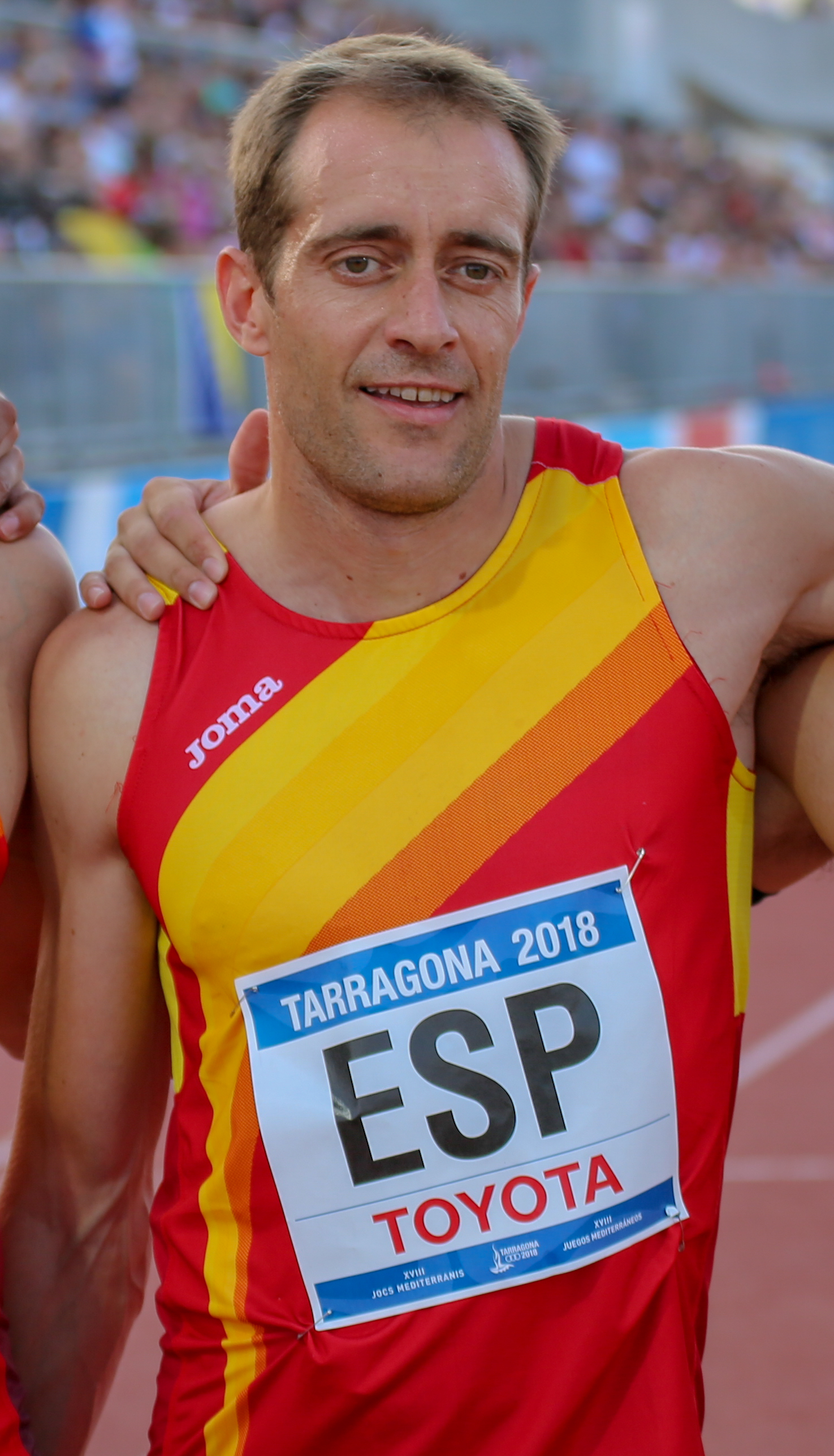 Ángel David Rodríguez en los relevos 4x100 en los Juegos del Mediterráneo 2018